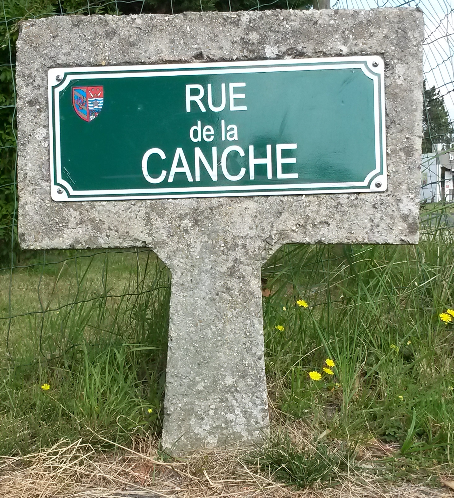 Plaque de rue au Touquet-Paris-Plage (juillet 2019)